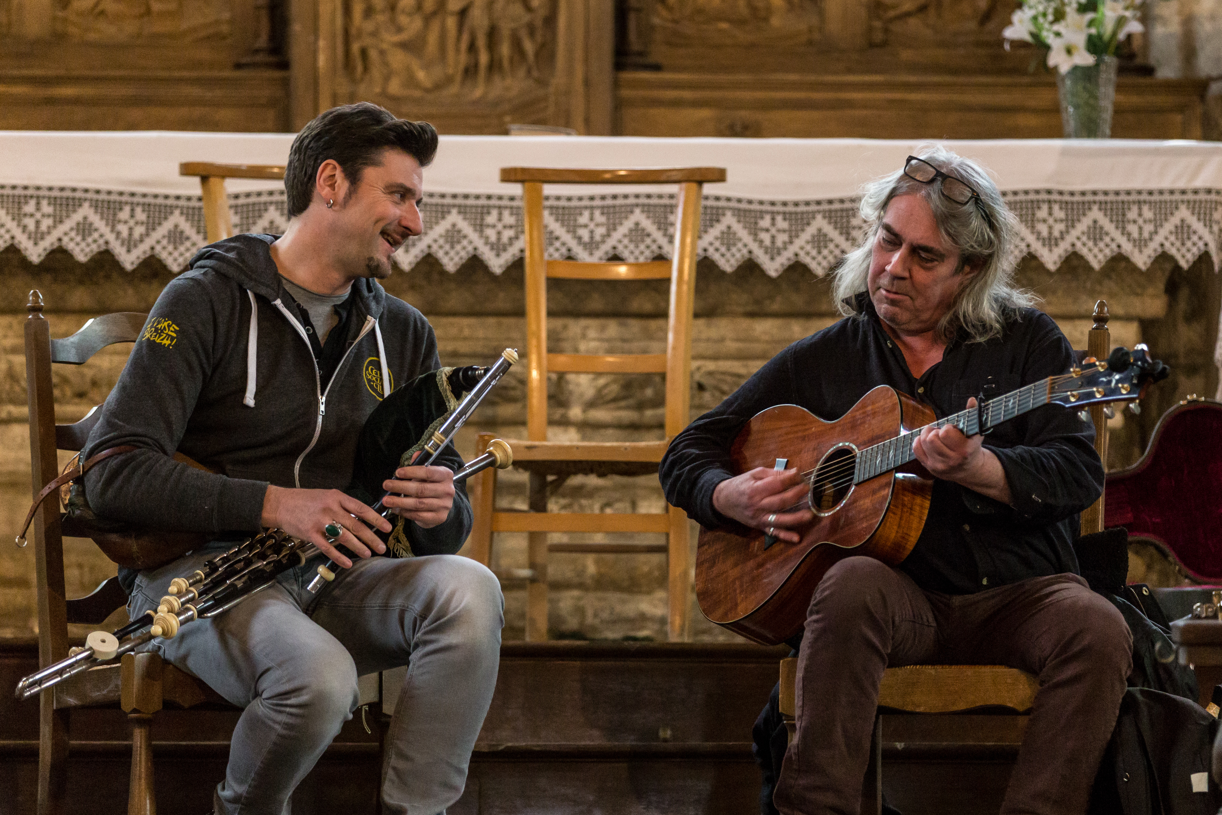 Ronan Le Bars et Nicolas Quemener en concert dans l'église Saint-Envel de Loc-Envel pour la Rando Muco le 24 avril 2016.